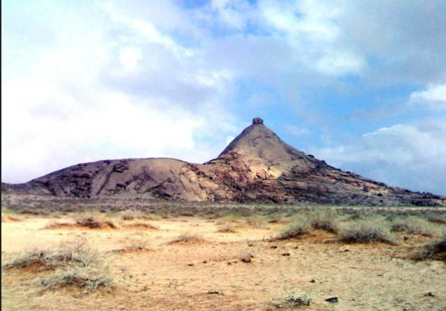 جبل خزاز الذي وقعت فيه معركة خزاز في العصر الجاهلي يبعد عن دخنة 5 كم